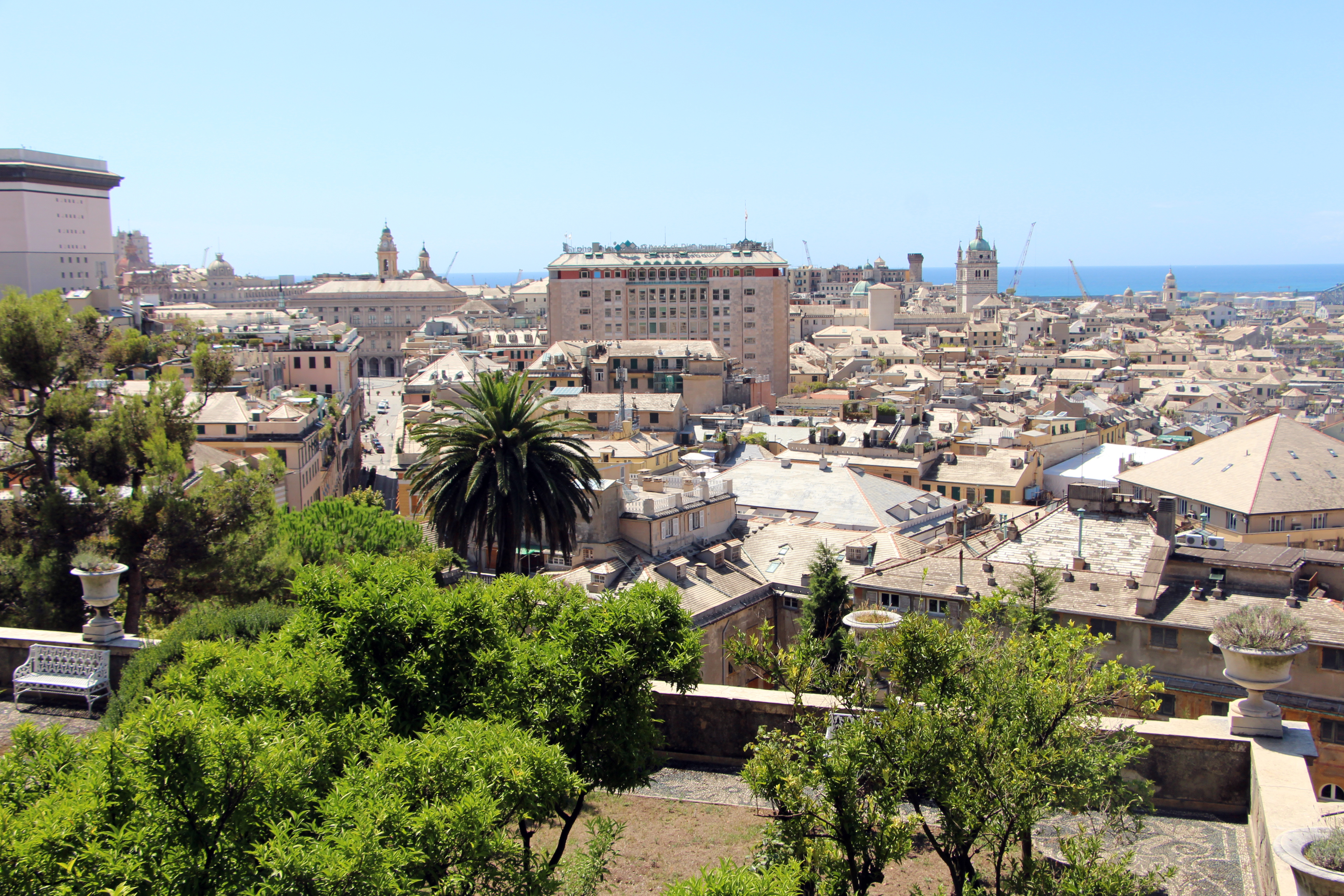 Villetta Di Negro This is a photo of a monument which is part of cultural heritage of Italy. The making of this document was supported by Wikimedia CH. (Submit your project!) For all the files concerned, please see the category Supported by Wikimedia CH.